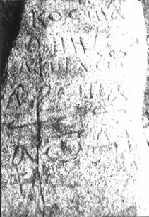 Оброчен камък Винище - възстановка © Emil Petrov 1988